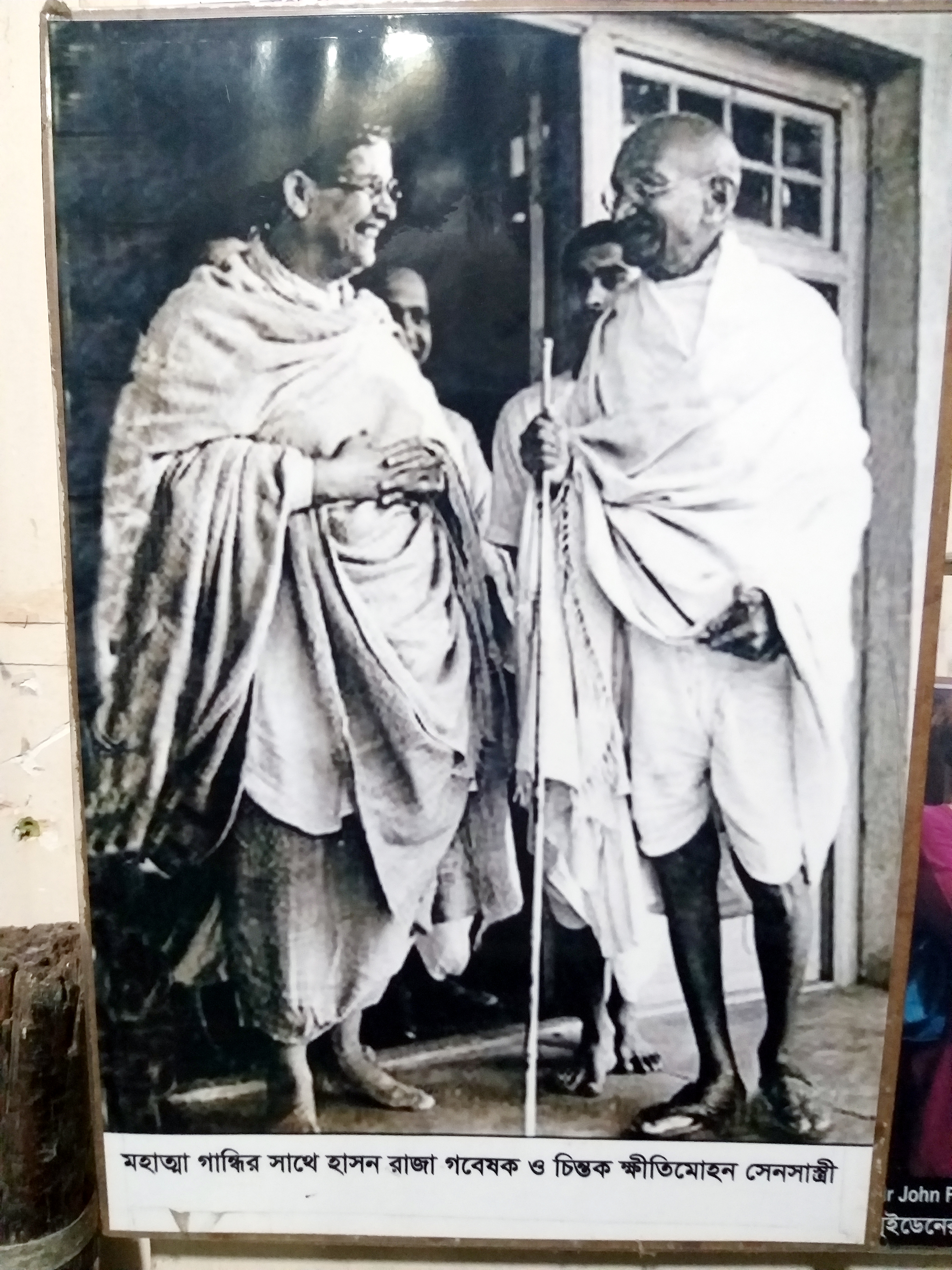 হাসন রাজার জমিদার বাড়ি Mohatto gandir Sathe Hason Rajar Gobeshok